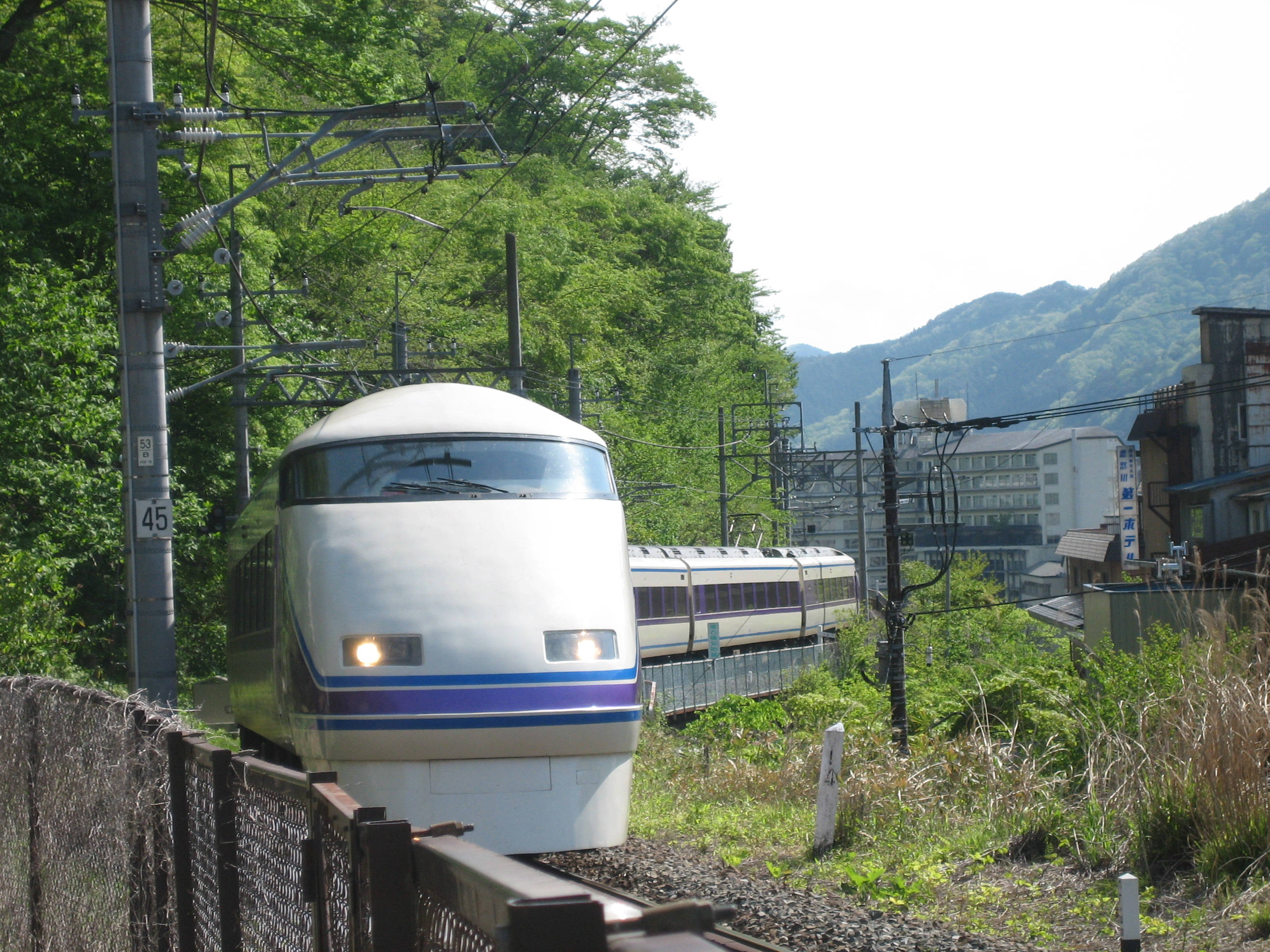 東武鬼怒川線を走行するスペーシア号